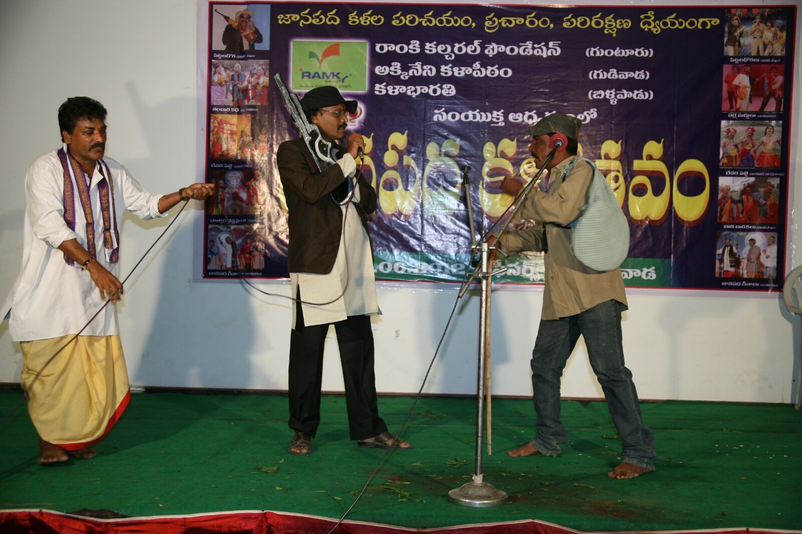 పిట్టలదొర నాటకంలో పిట్టలదొరగా నటిస్తున్న తాతా రమేశ్ బాబు